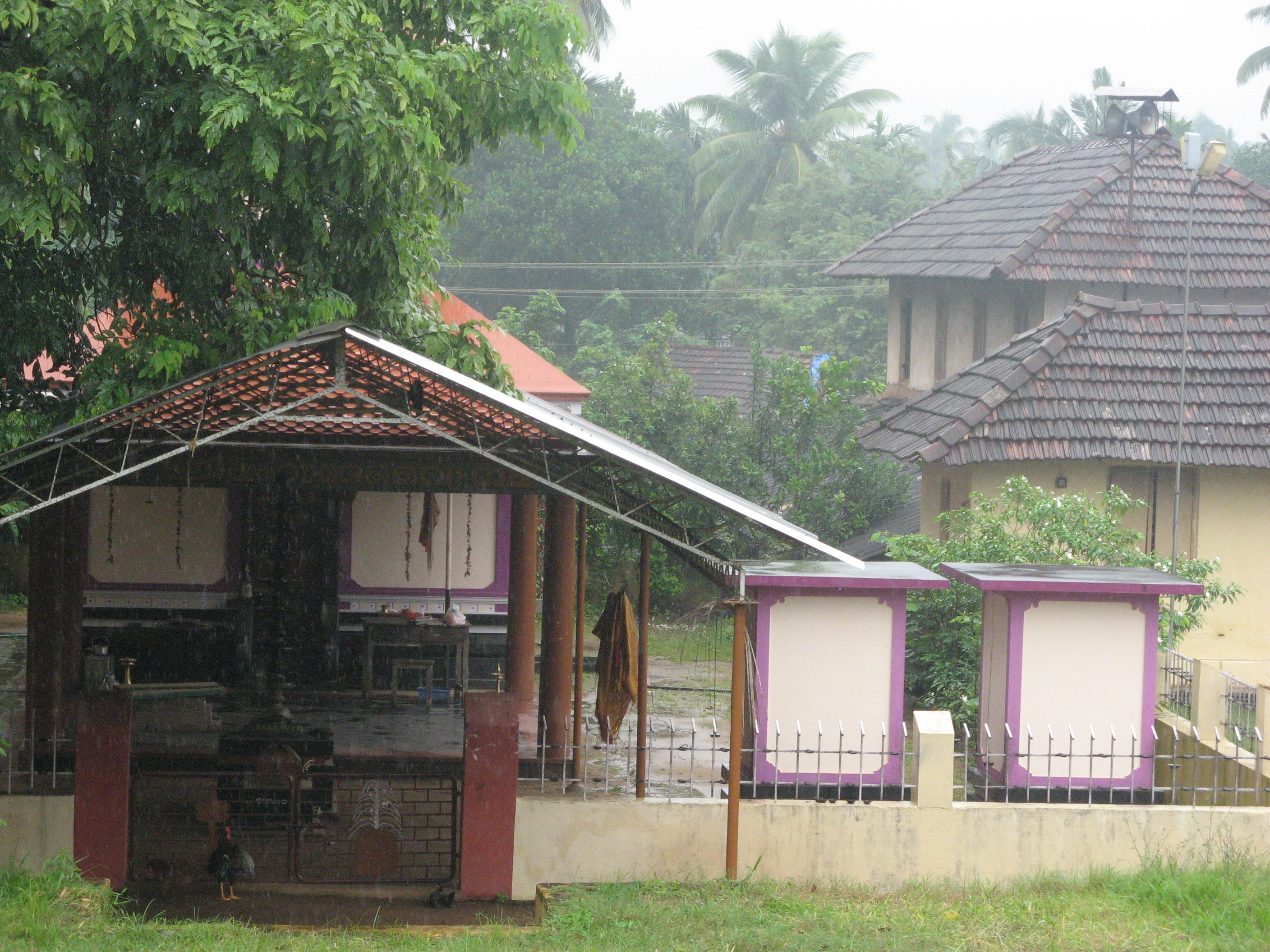 പുറപ്പിള്ളിക്കാവ് ഭഗവതി ക്ഷേത്രം